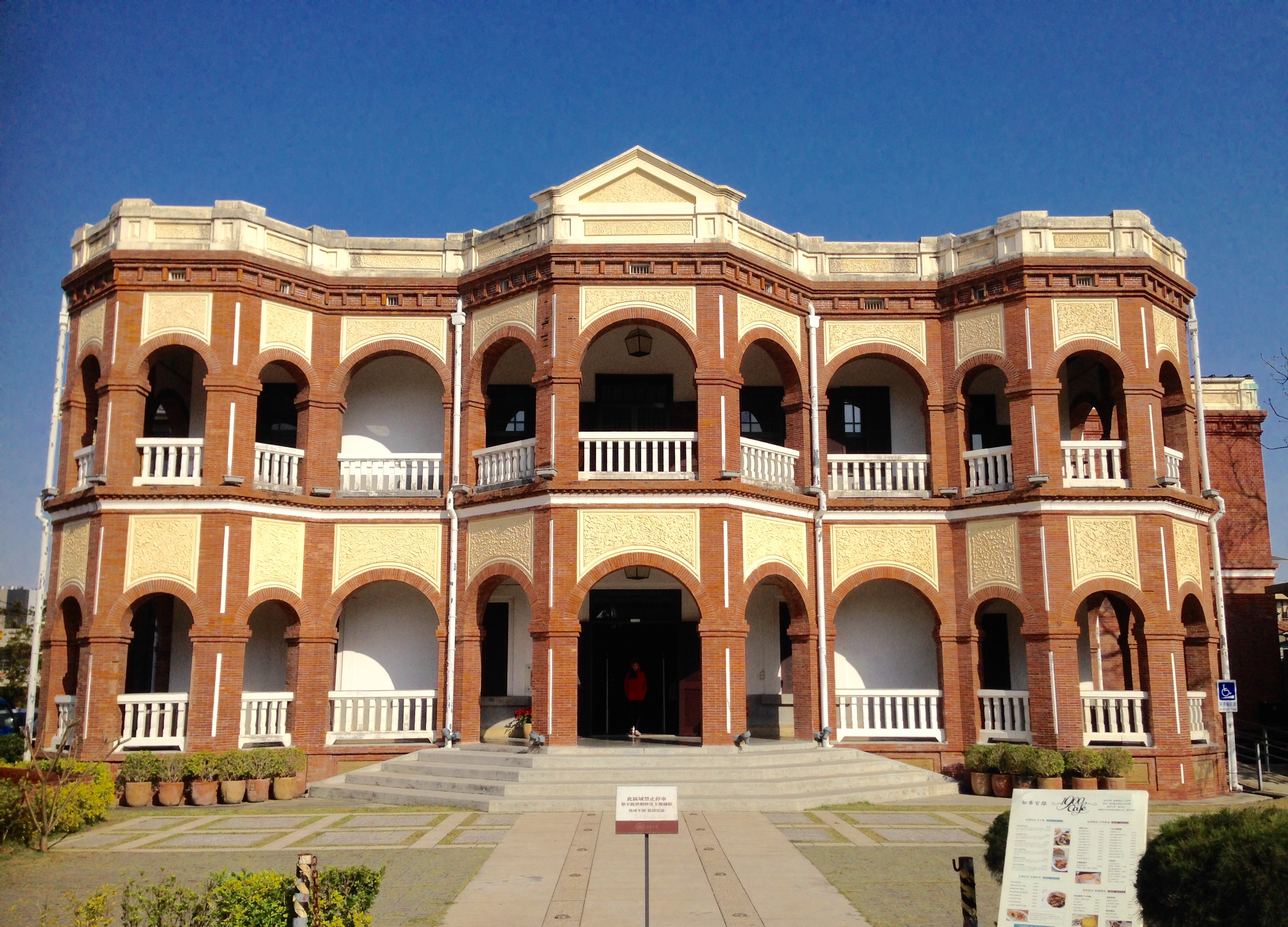 臺南縣知事官邸